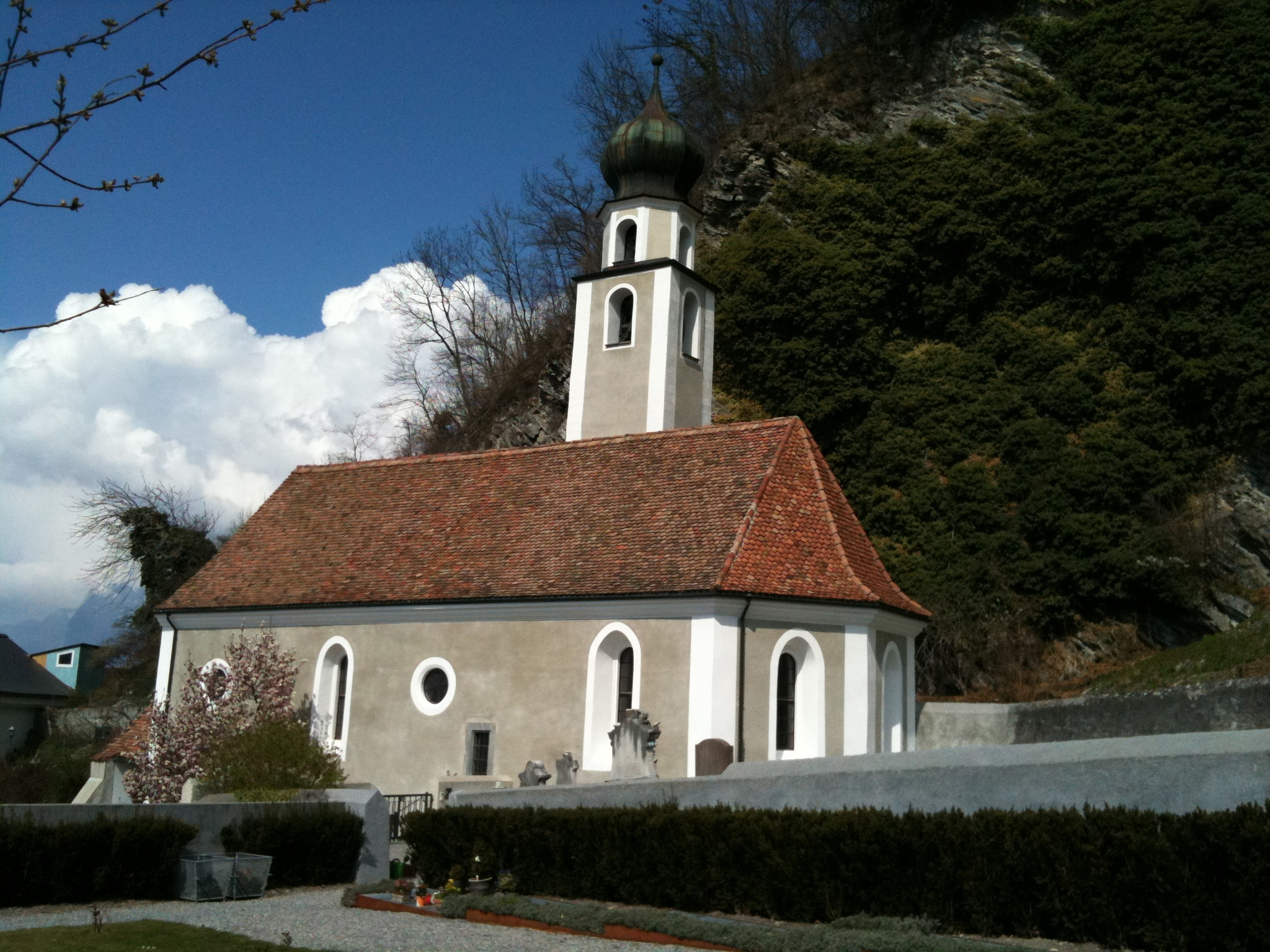 reformierte Kirche Trimmis, Kanton Graubünden